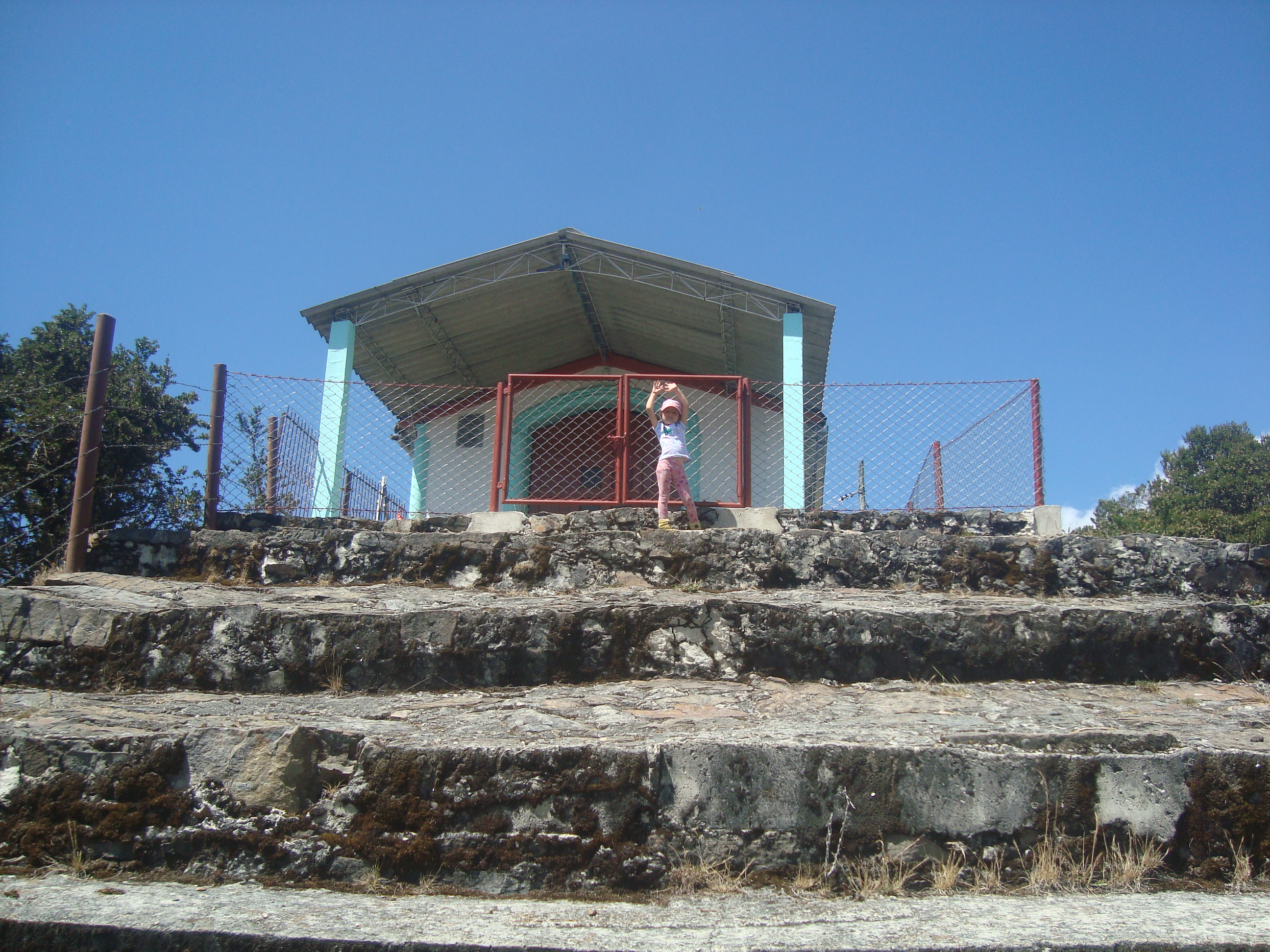 Güicán, Boyacá, Colombia